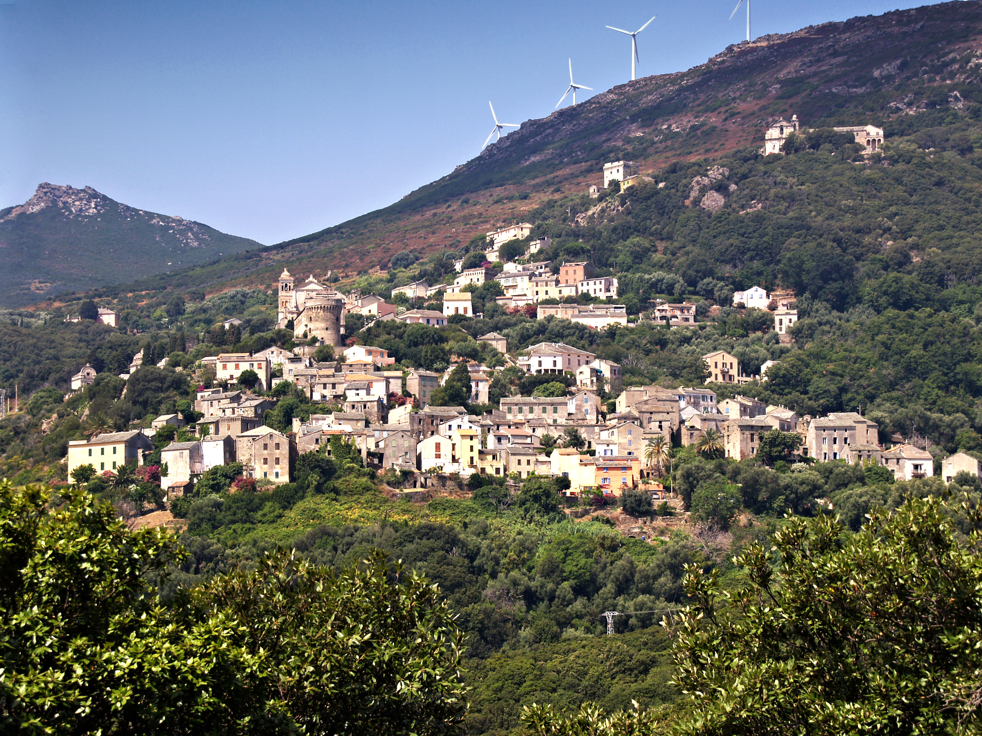 Rogliano (Corse) - Bettolacce